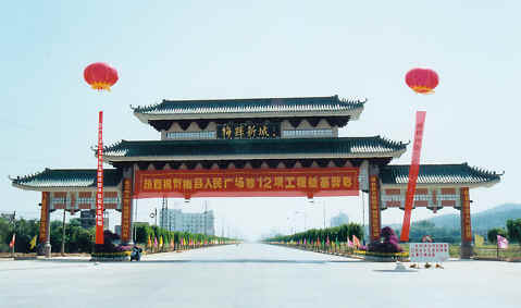 梅县新城